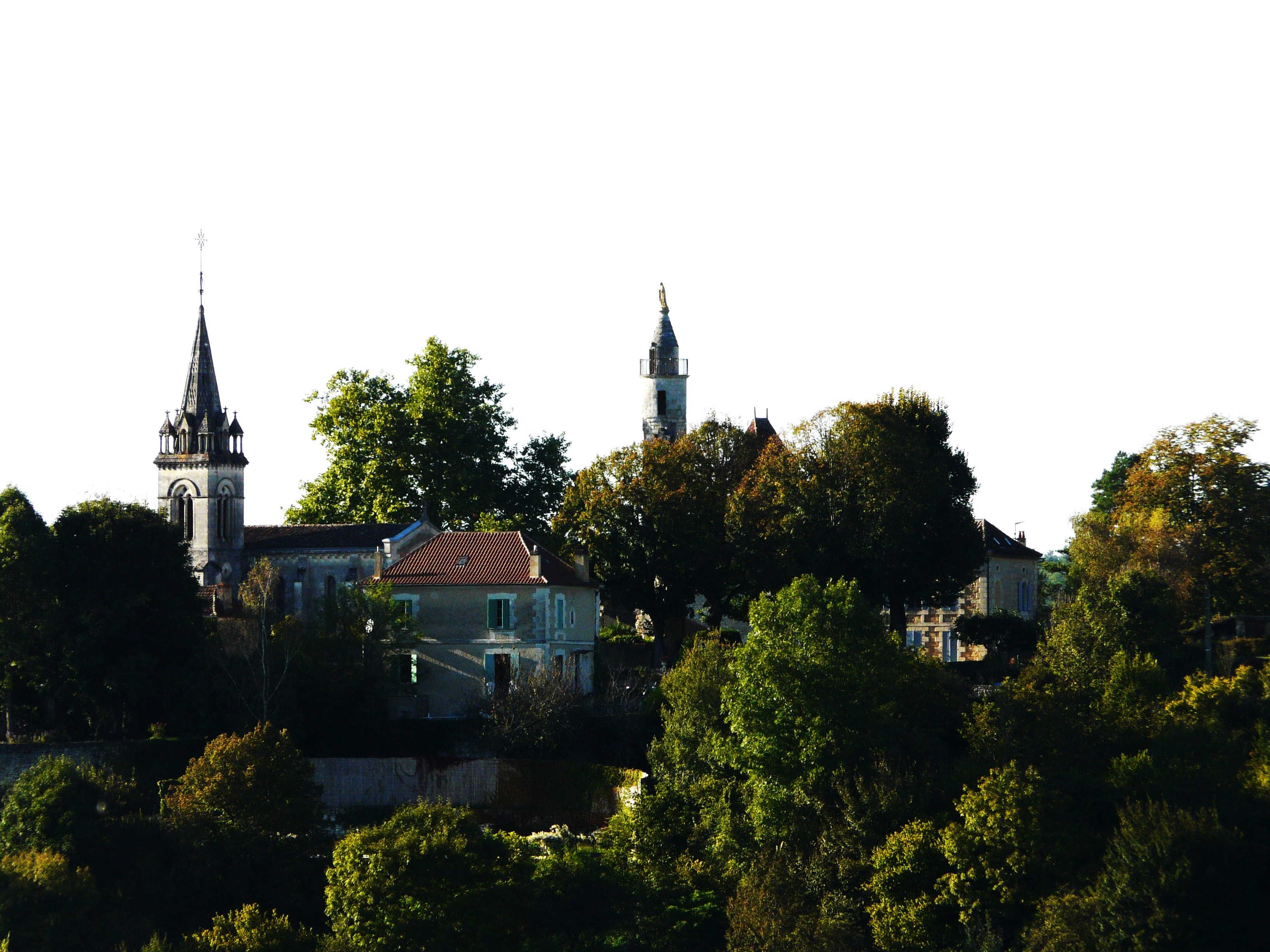 Vue générale de Clermont-de-Beauregard Dordogne, France